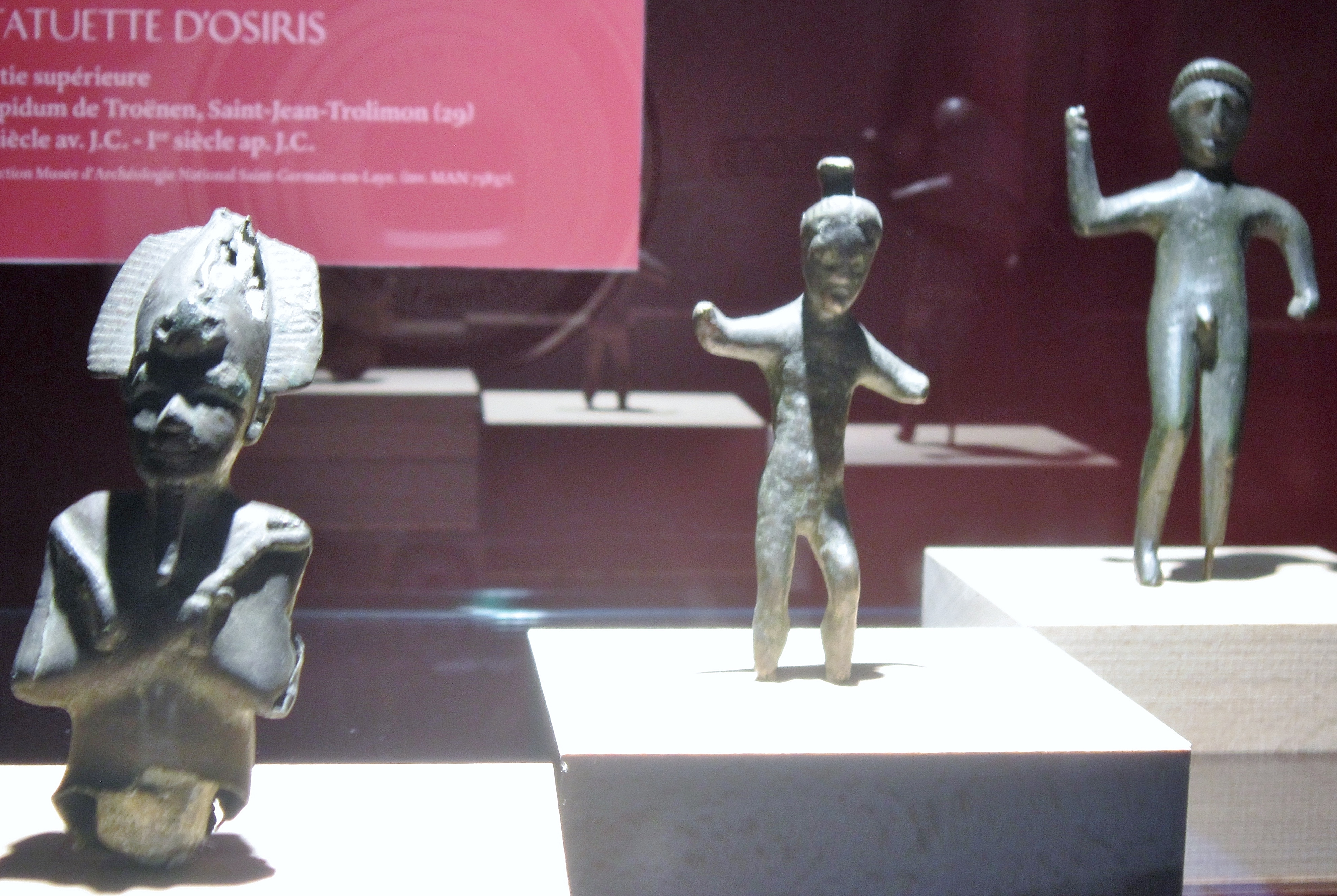 Trois statuettes d'époque gallo-romaine : à droite statuette d'un dieu trouvée à la Pointe du Raz (entre le 1er et le 3e siècle après J.-C.), au centre statuette de Mars trouvée à Plogastel-Saint-Germain (entre le 1er et le 3e siècle après J.-C.), à gauche partie supérieure d'une statuette d'Osiris trouvée dans l'oppidum de Tronoën en Saint-Jean-Trolimon (entre le 1er siècle avant et le 1er siècle après J.-C) [Musée d'archéologie national de Saint-Germain-en-Laye, exposition "L'empreinte de Rome", musée de Douarnenez].